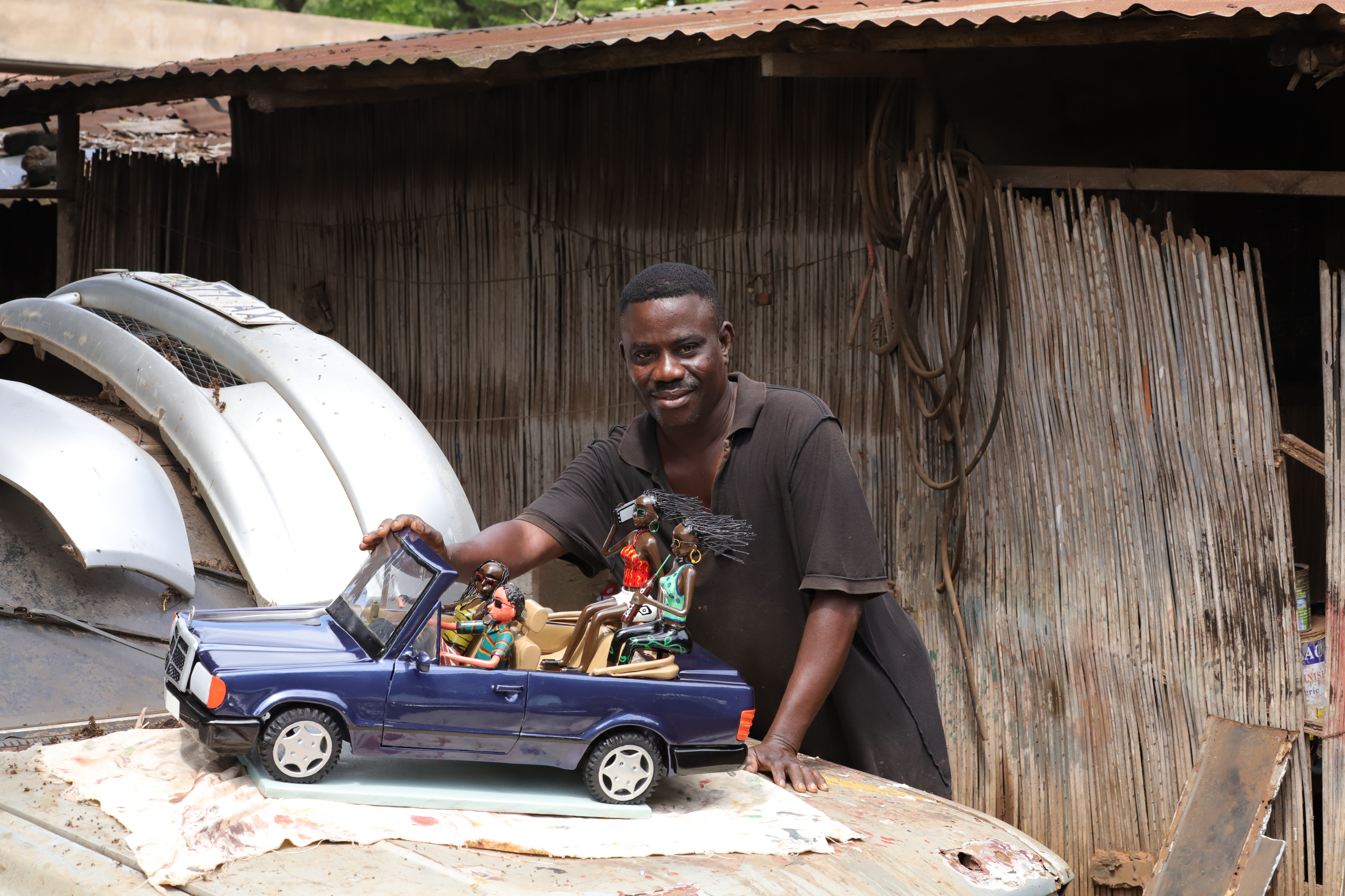 Didier Ahadsi mit einem seiner Werke aus der Serie Rising Africa: Drei Afrikanische Mädchen begleiten einen Europäischen Mann in seinem Mercedes Cabrio.